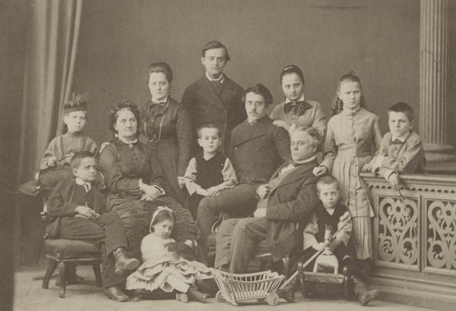 Князь Николай Иванович Шаховской (1823—1900) с женой Натальей Алексеевной (1834—1918; ур. Трубецкой) и детьми.